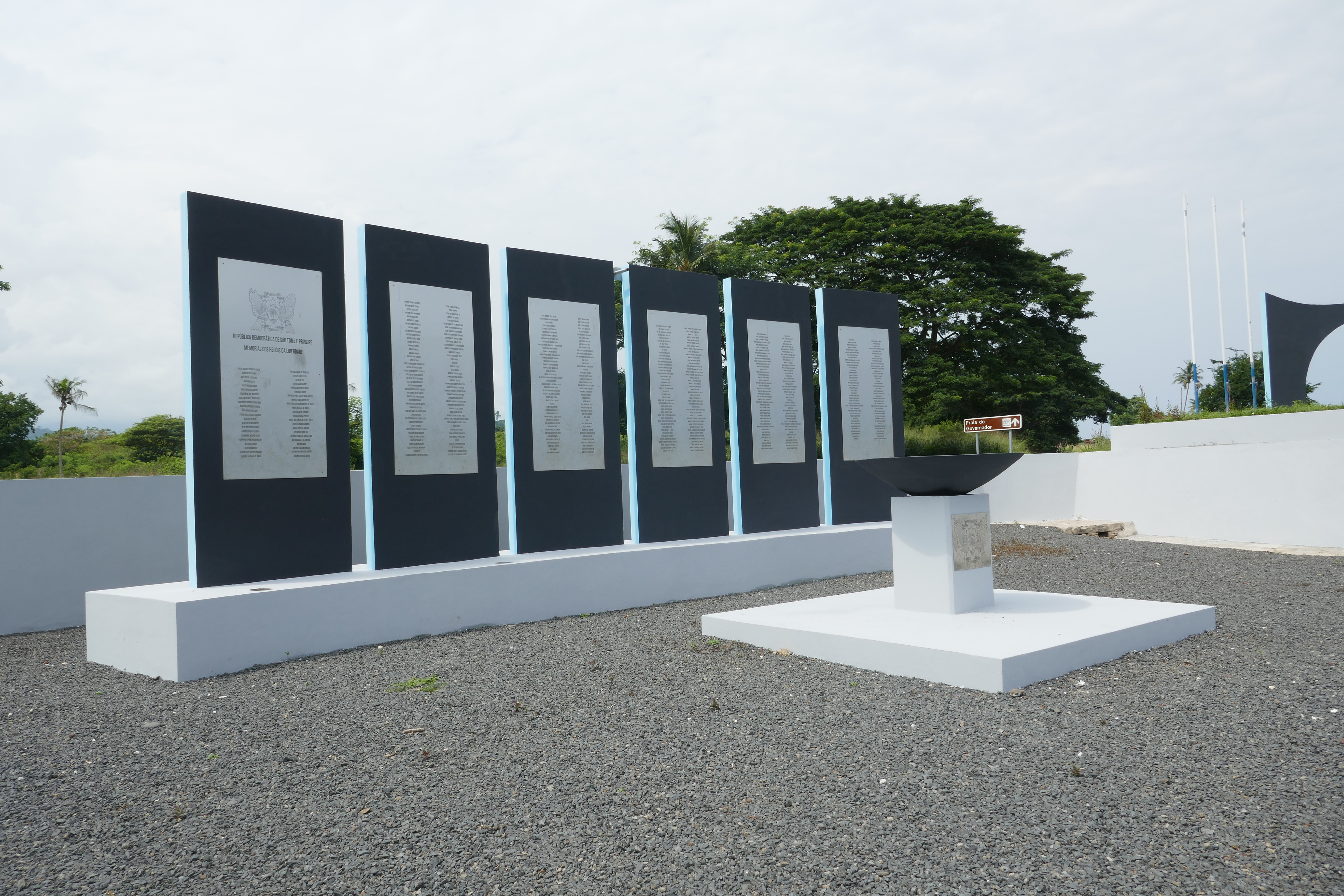 Monument à la mémoire des martyrs du 3 février 1953, érigé en 2015 sur la plage de Fernão Dias, au nord de l'île de São Tomé.